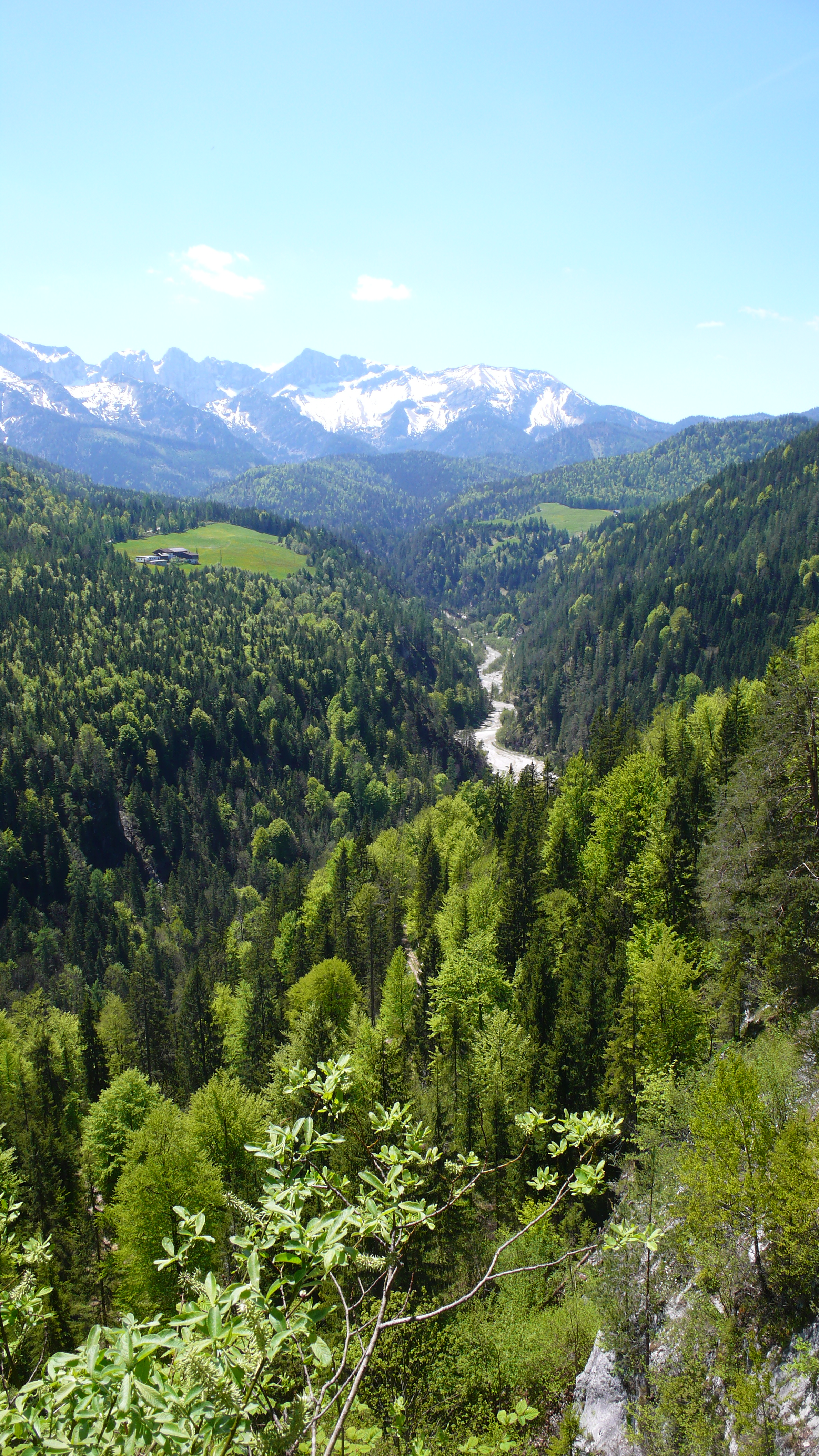 Steinberg am Rofan, Blick Richtung Brandenberg